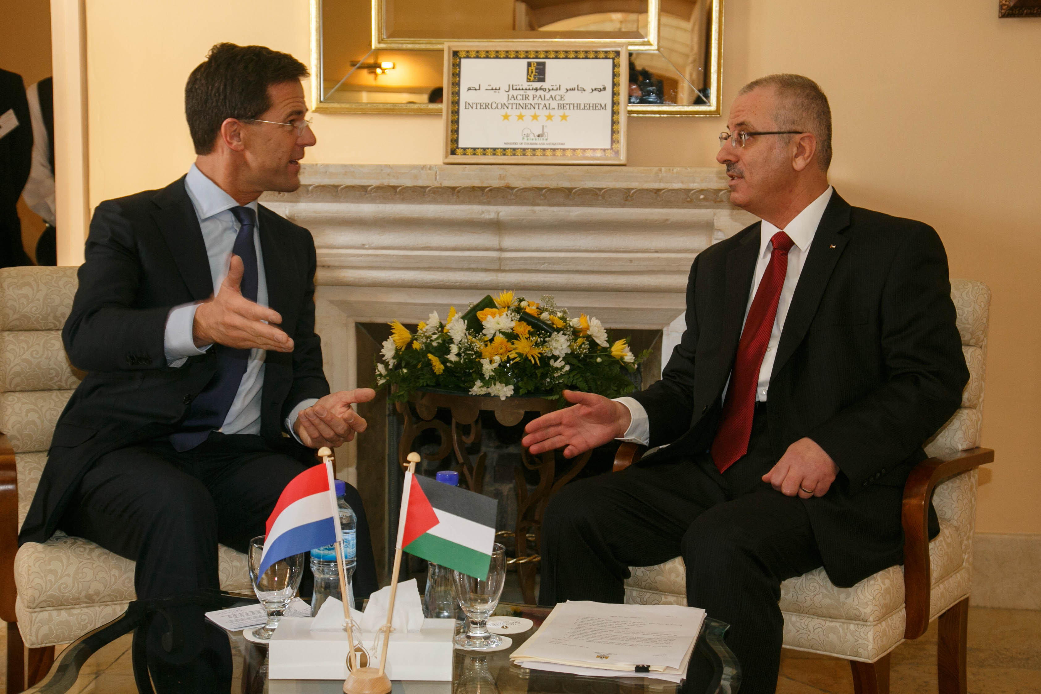 Minister-president Rutte in gesprek met zijn ambtgenoot minister-president Hamdallah van de Palestijnse autoriteit. Rutte bezoekt Israël en de Palestijnse Gebieden voor de officiële start van de bilaterale samenwerkingsfora met Israël en met de Palestijnse Gebieden. Hij wordt hierbij vergezeld door minister Timmermans van Buitenlandse Zaken en minister Ploumen voor Buitenlandse Handel en Ontwikkelingssamenwerking. Met de delegatie reist ook een handelsdelegatie mee onder aanvoering van VNO/NCW-voorzitter Bernard Wientjes met ongeveer 70 Nederlandse bedrijven en rond de 15 kennisinstellingen. Doel van de bilaterale samenwerkingsfora is het verder verstevigen van de goede betrekkingen met Israël en met de Palestijnse Gebieden. Overkoepelend thema is innovatie, met de nadruk op agro-food, energie/gas en water. Daarnaast wordt specifiek bij het samenwerkingsforum met de Palestijnse Gebieden het accent gelegd op ICT. Naast overheden zijn bedrijven, kennisinstellingen en niet-gouvernementele organisaties bij het Forum betrokken. Foto: Assaf Shilo